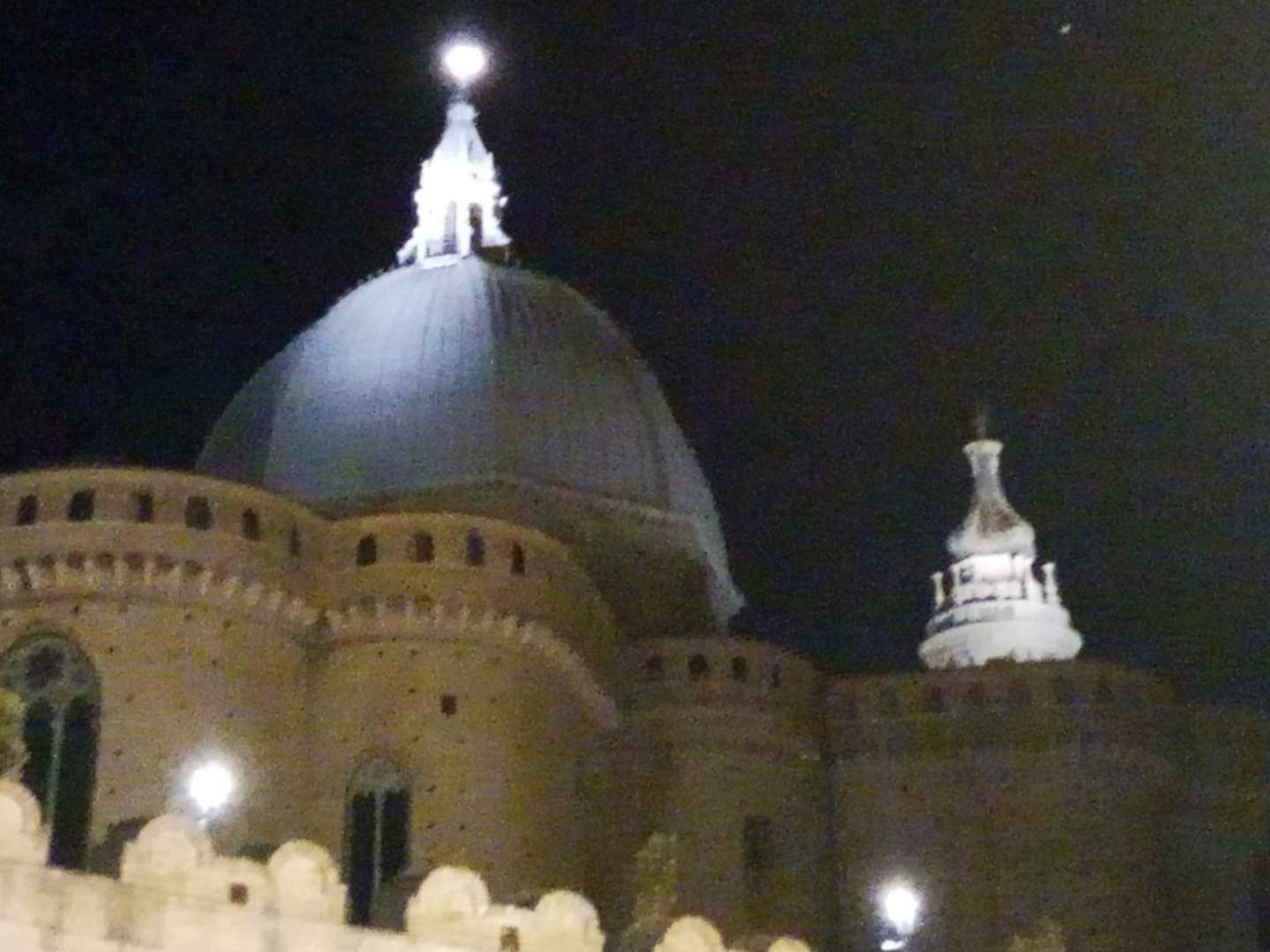 La Cupola restaurata (2020) - Foto di Gianluca Nocelli